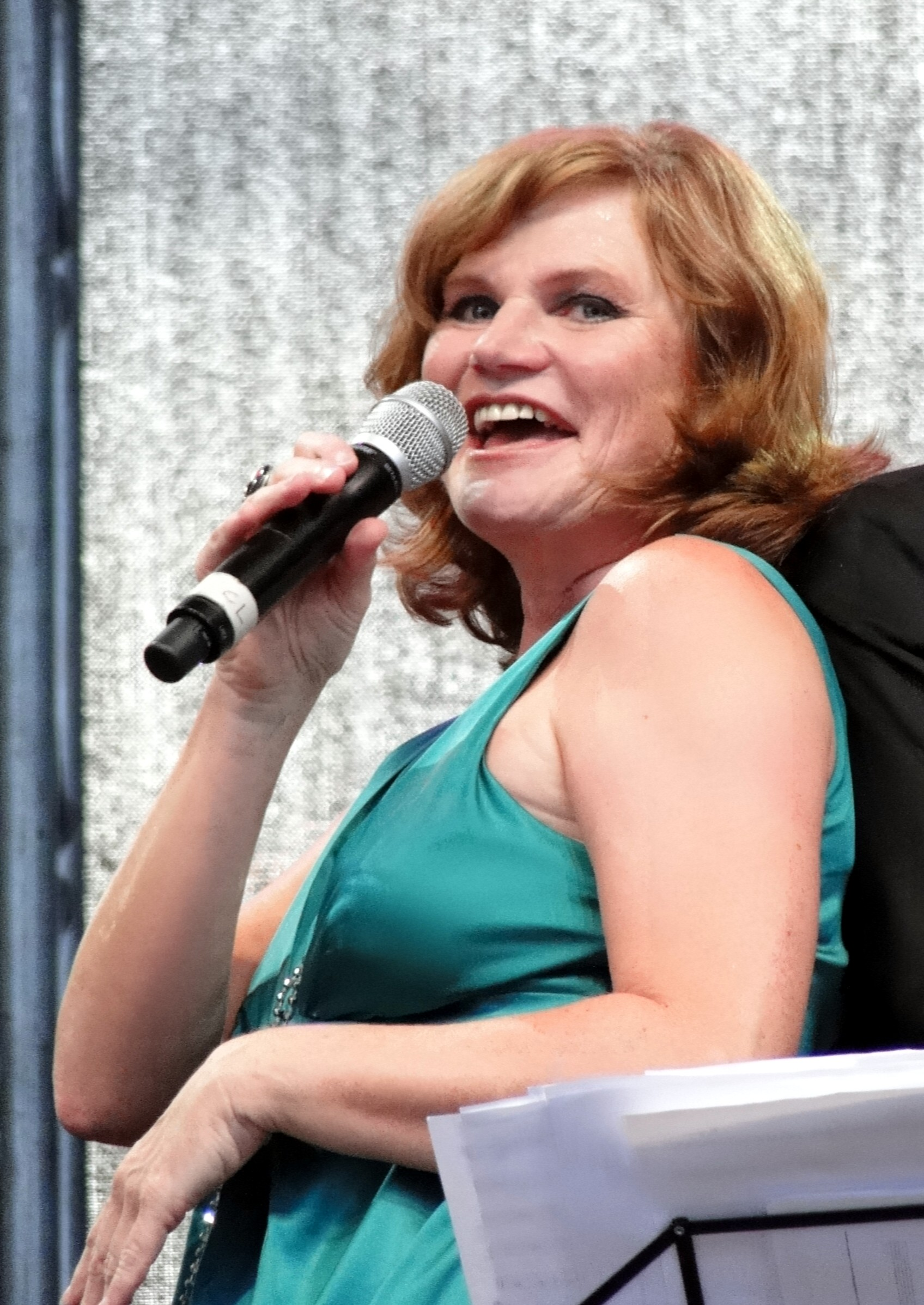 Pe Werner bei einem Auftritt im August 2010